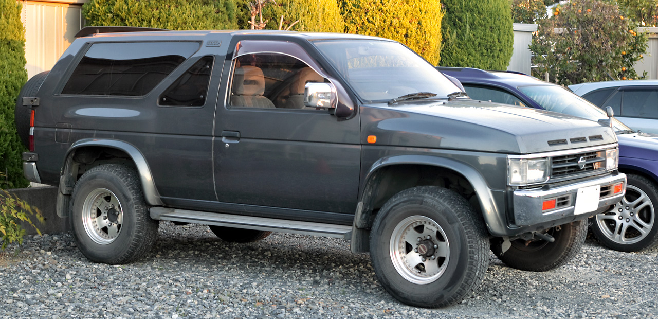 Nissan Terrano 2door 3.0 R3-M ( D21 )